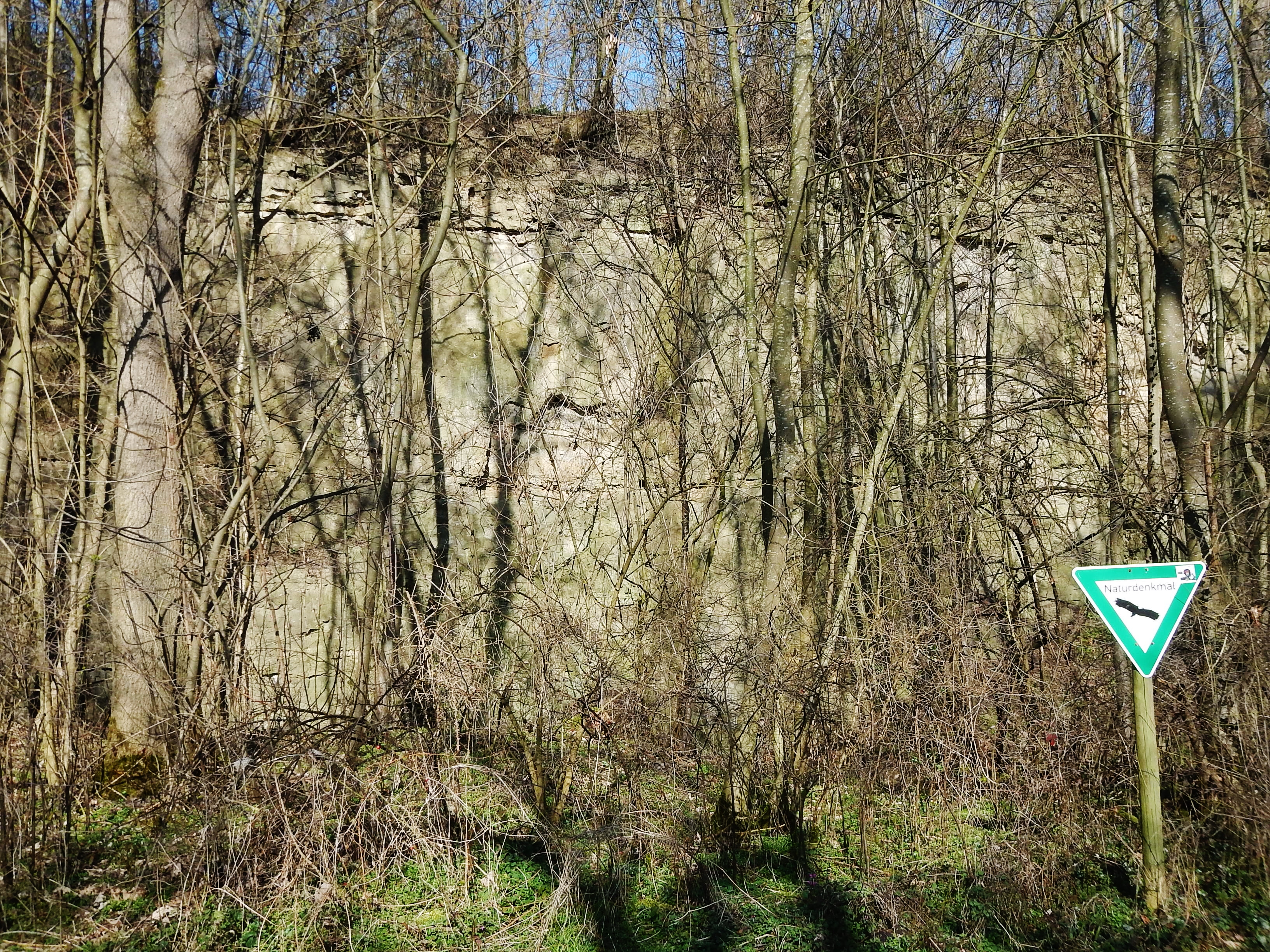 Das Geotop Aufg. Steinbruch im Gewann Rotenacker NE von Markgröningen im Markgröninger Leudelsbachtal. Es ist als Naturdenkmal Ehemaliger Steinbruch geschützt.